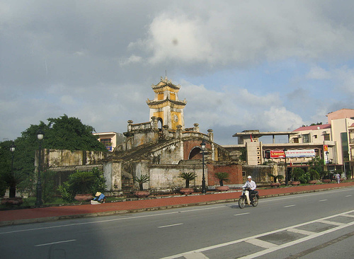 Quang Binh Citadel Gate in Dong Hoi, Quang Binh, Vietnam